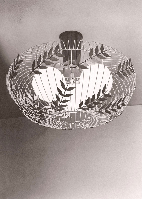 Burlampa modell nr 5C, Hans Bergström